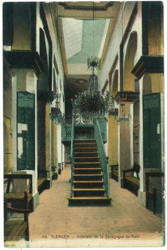 היכל בית הכנסת של הרב אפריים אנקאווה בתלמסאן